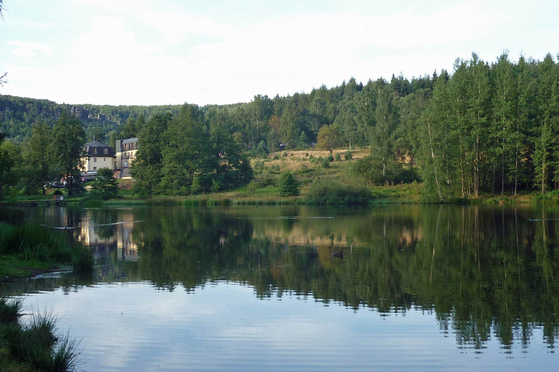 Teich in Eiland/Ostrov im Elbsandsteingebirge